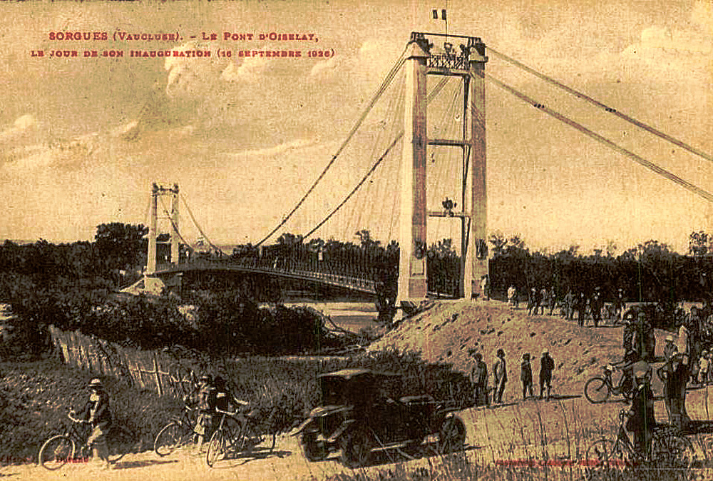 Inauguration du pont des Arméniers